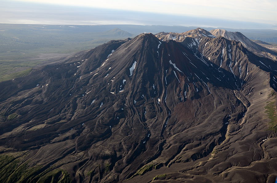 Вулкан Кихпиныч